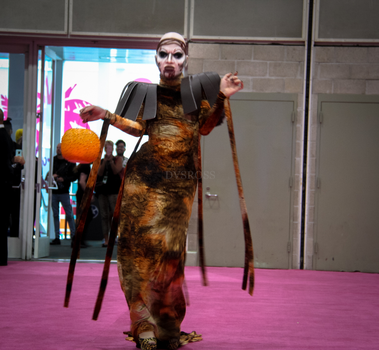 Rupaul DragCon 2019 - Los Angeles